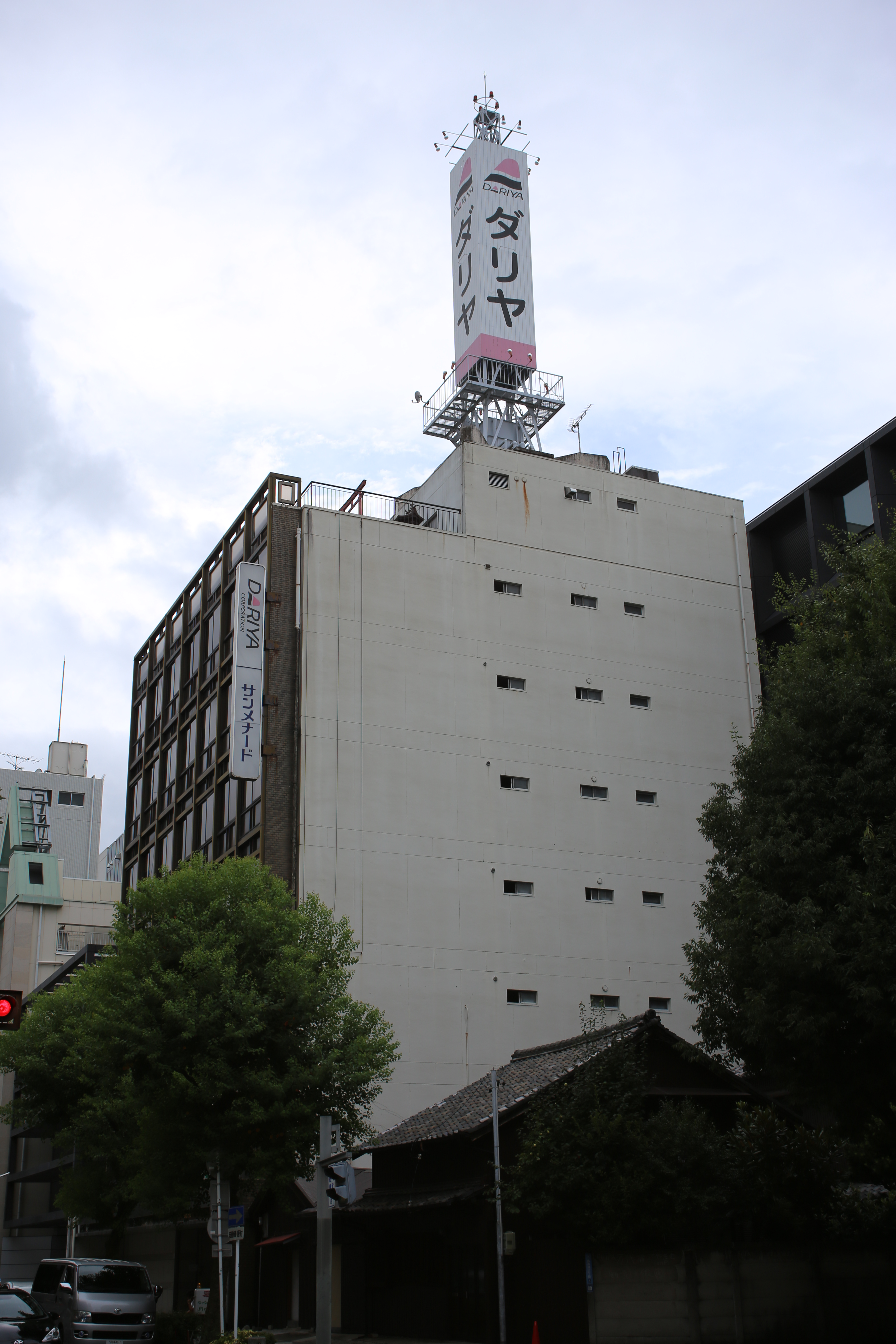 名古屋市中区丸の内三丁目のダリヤ本社を東側公道南側より撮影